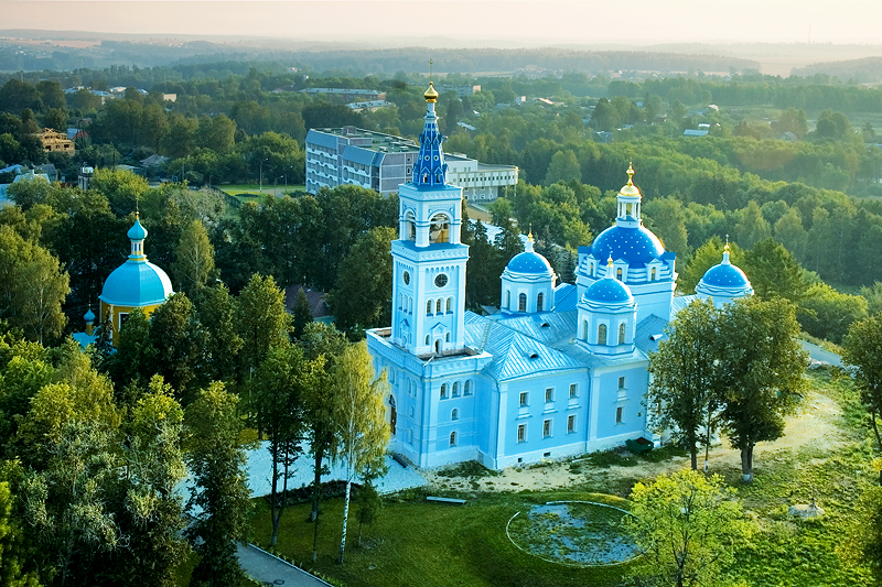 Храм в Деденёво (Россия Подмосковье)